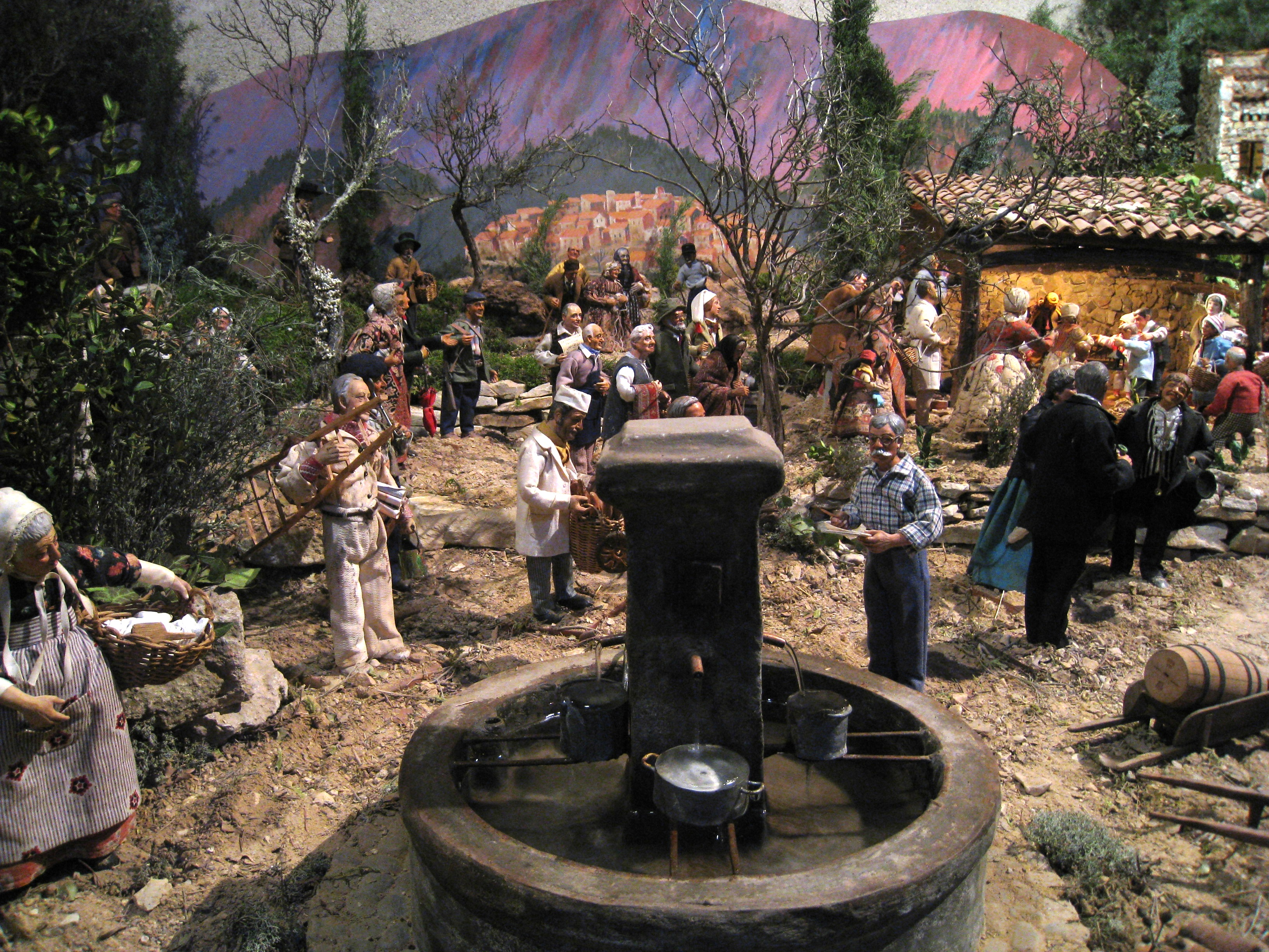 Creche de Grambois en 2008